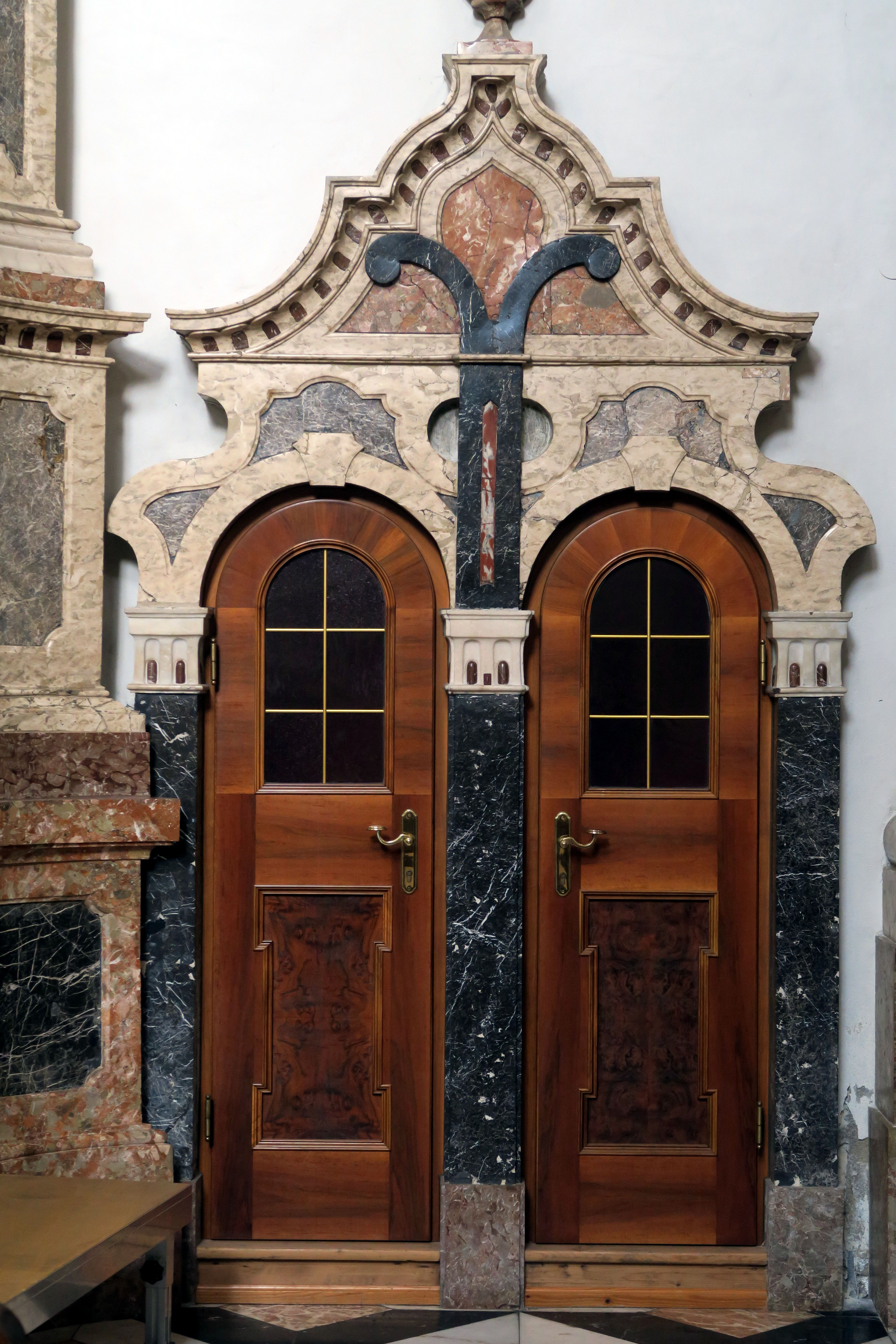 Barocker Beichstuhl mit zwei Türen